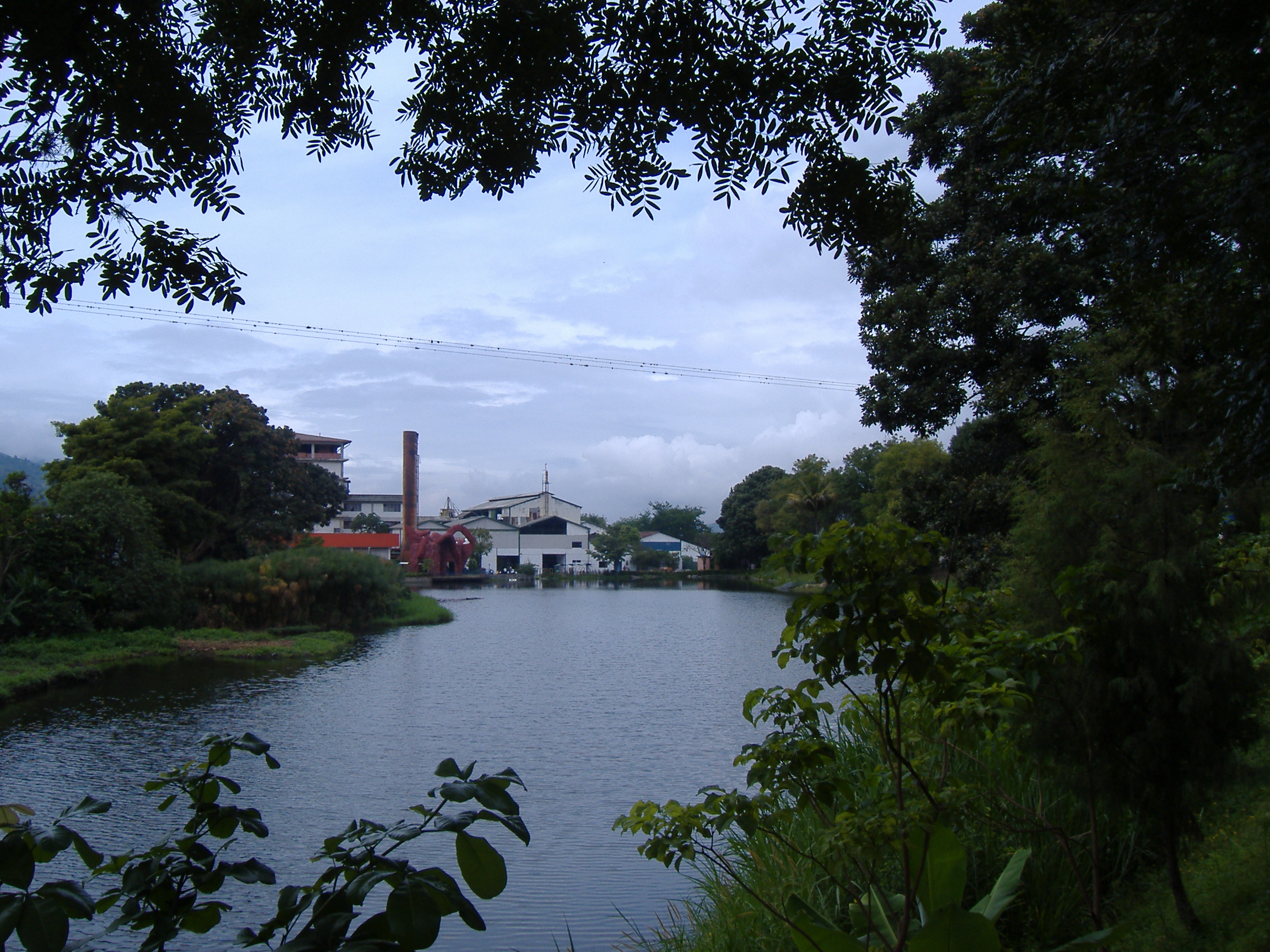 Laguna La Rosa ubicada en la ciudad de Mérida, Venezuela. Al fonde además se puede apreciar el Museo de Ciencia y Tecnología de la ciudad. Imagen tomada por Jorge Paparoni el 24/11/2005. Para publicaciones externas se agradece nombrar fuente y fotógrafo.